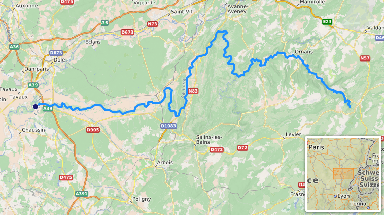 carte réalisée sur umap [1] This map may be incomplete, and may contain errors. Don't rely solely on it for navigation.